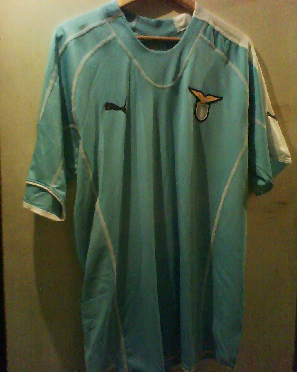 Maillot home de la SS Lazio de la saison 2005-2006